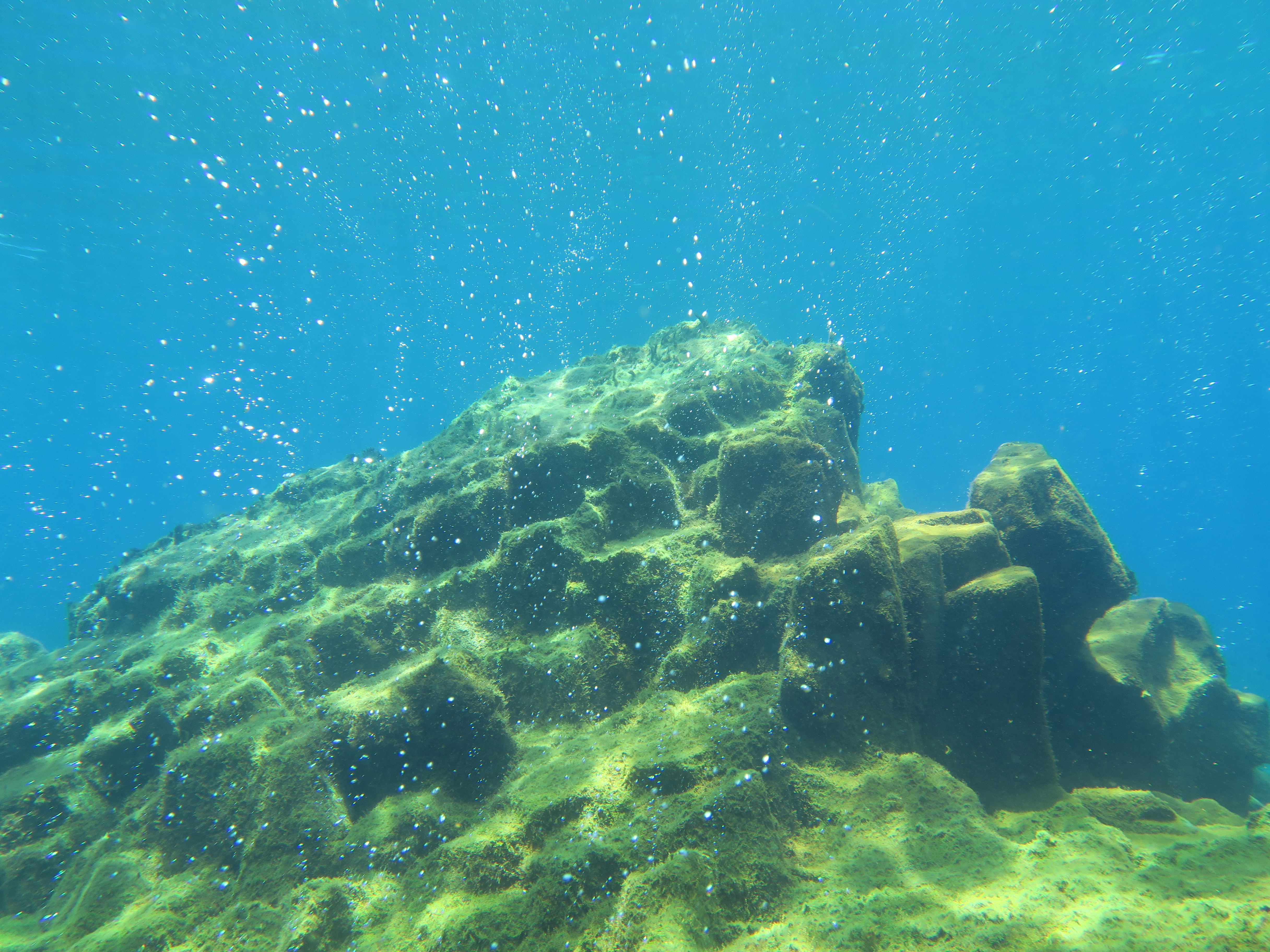 Gelembung-gelembung udara keluar dari area gunung api bawah laut (Banua Wuhu) pulau Mahengetang, Kepulauan Sangihe, Indonesia.